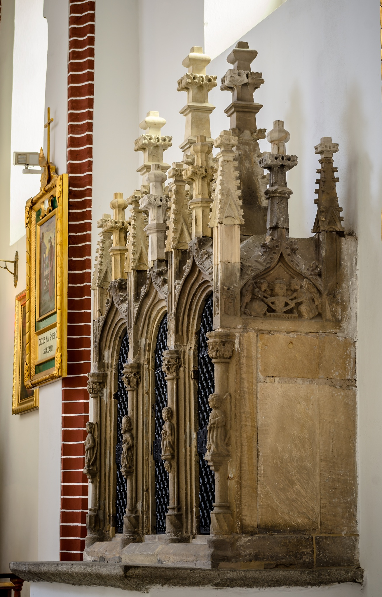 Kościół Bożego Ciała we Wrocławiu - wnętrze